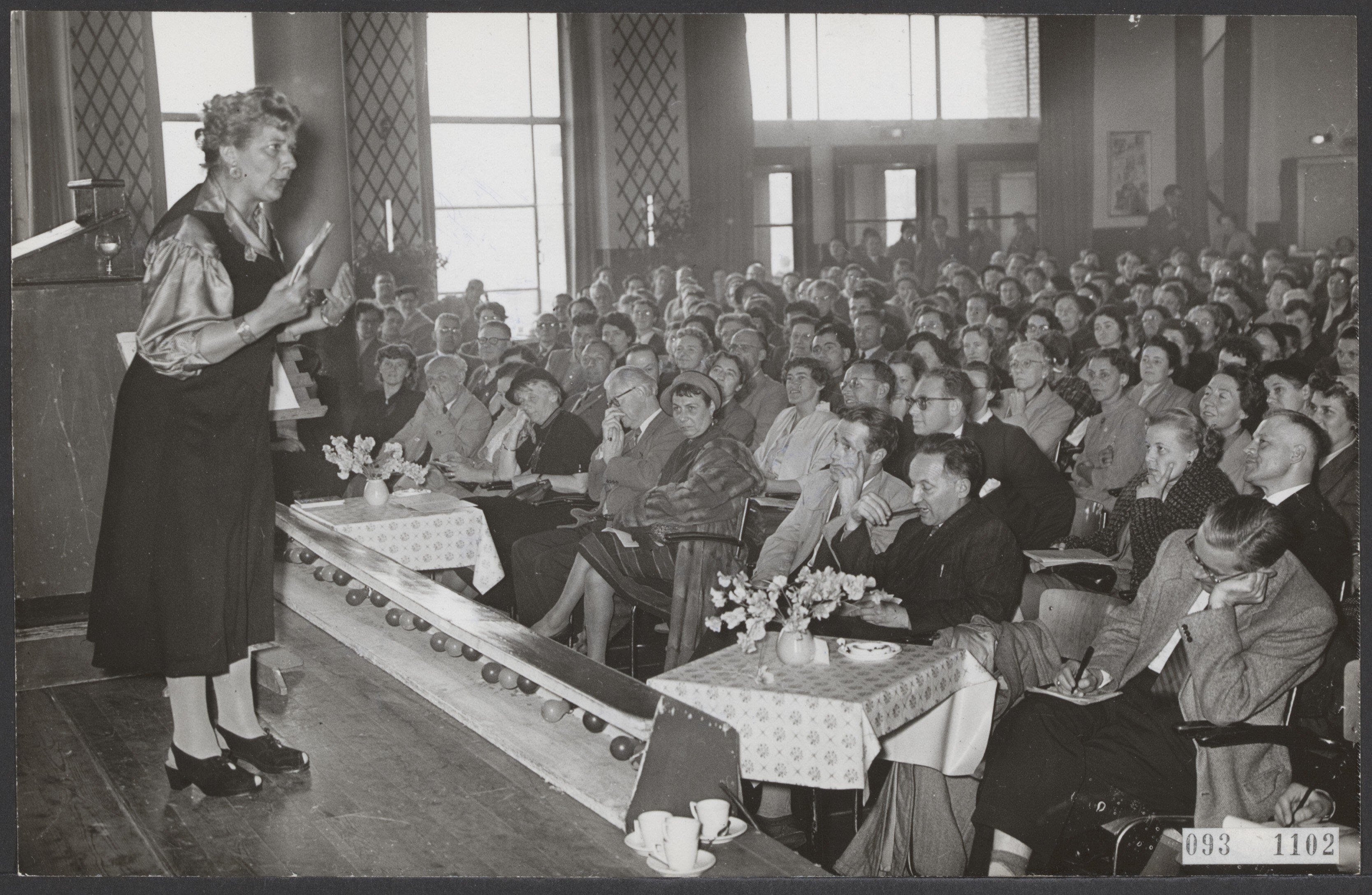 Collectie / Archief : Fotocollectie Elsevier Reportage / Serie : [ onbekend ] Beschrijving : Wereld Vrijgezellendag in de Houtrusthallen te Den Haag. Mary Pos bracht een speciale boodschap uit Amerika Annotatie : Mary Pos (1904-1987) was schrijfster en reisjournaliste Datum : 18 mei 1955 Locatie : Den Haag, Zuid-Holland Trefwoorden : bijeenkomsten, evenementen, vrijgezellen Persoonsnaam : Pos Mary Fotograaf : Bilsen, Joop van / Anefo Auteursrechthebbende : Nationaal Archief Materiaalsoort : Foto (zwart/wit) Nummer archiefinventaris : bekijk toegang 2.24.05.02 Bestanddeelnummer : 093-1102